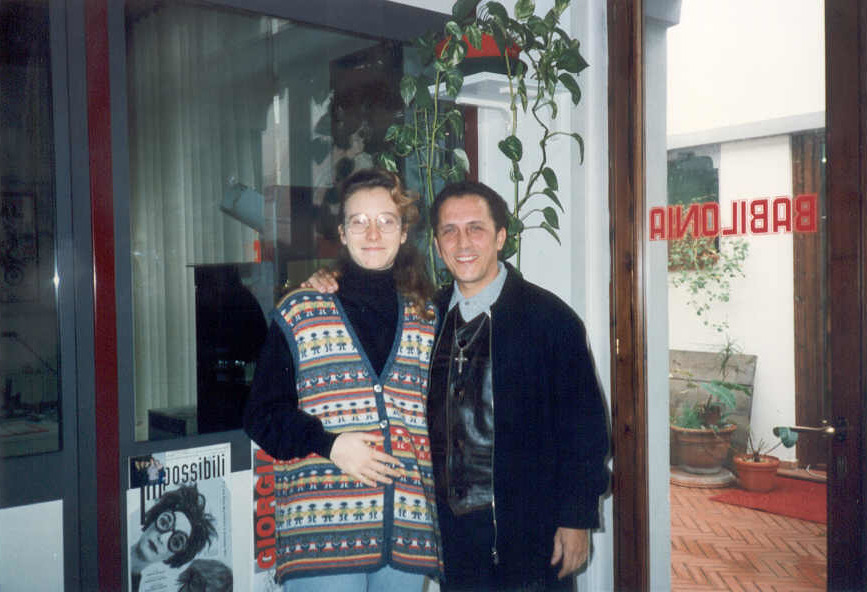 archivio personale di Cinzia Donati